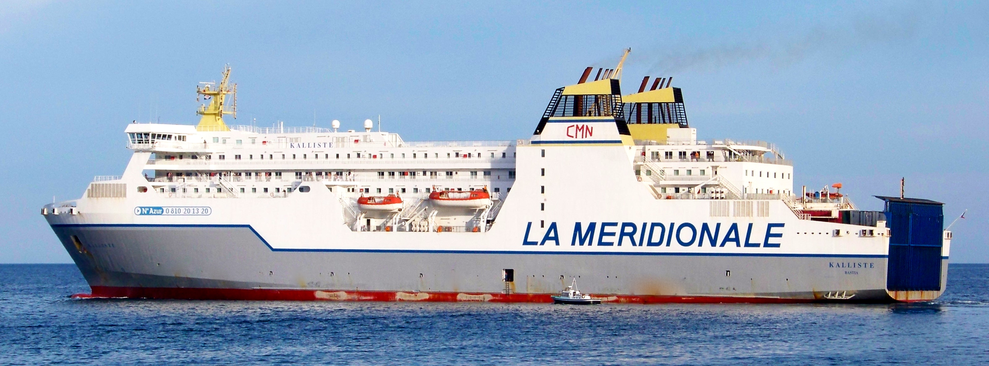 le Kalliste avant ses nouvelles couleurs